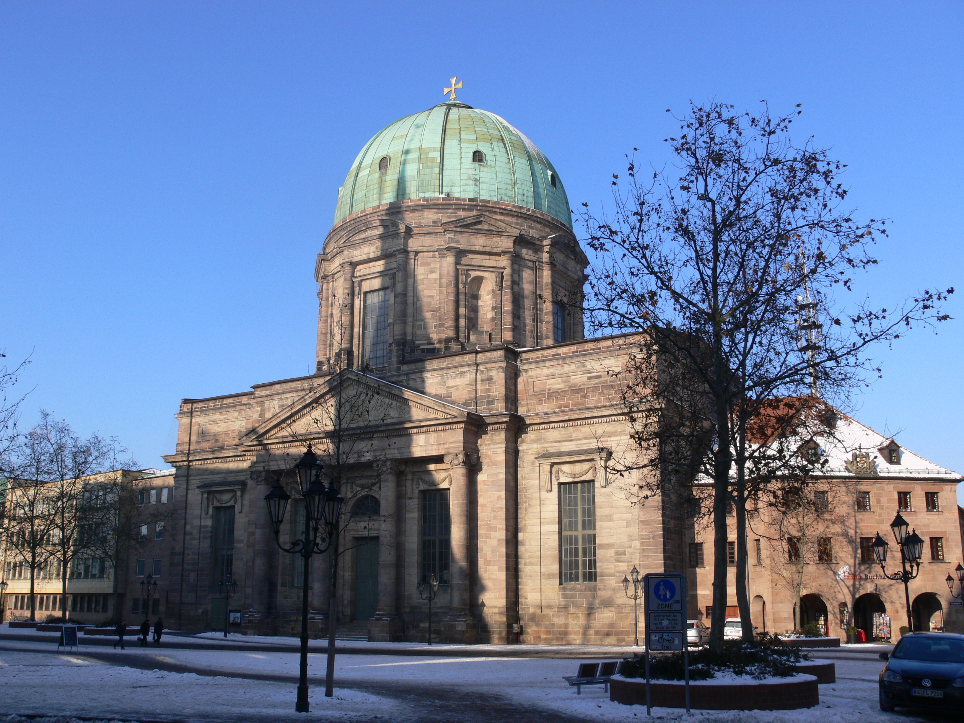 Nürnberg, Kirche St. Elisabeth